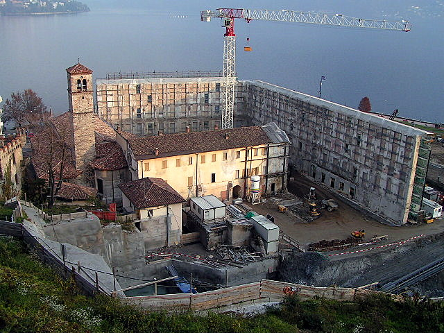 Cantiere attorno alla Chiesa di Santa Maria degli Angioli, Lugano